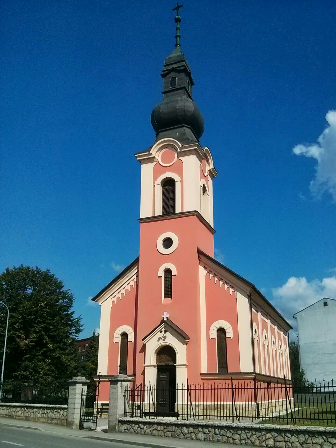 Orthodox church, Prijedor